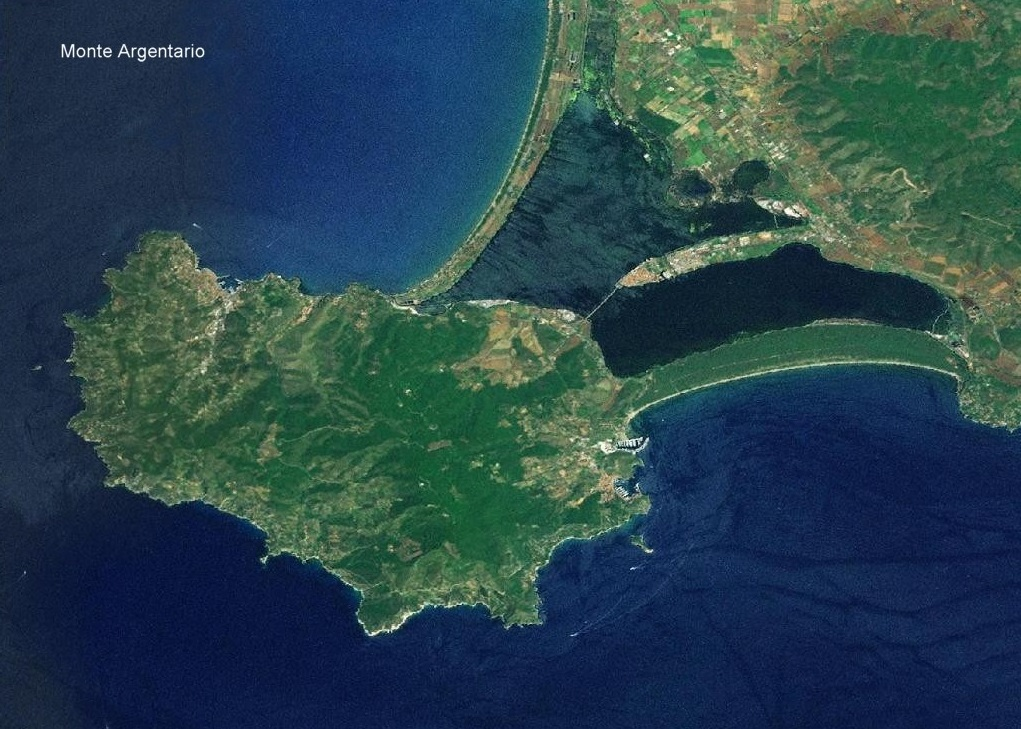 Promontorio dell'argentario fotografato dal satellite.